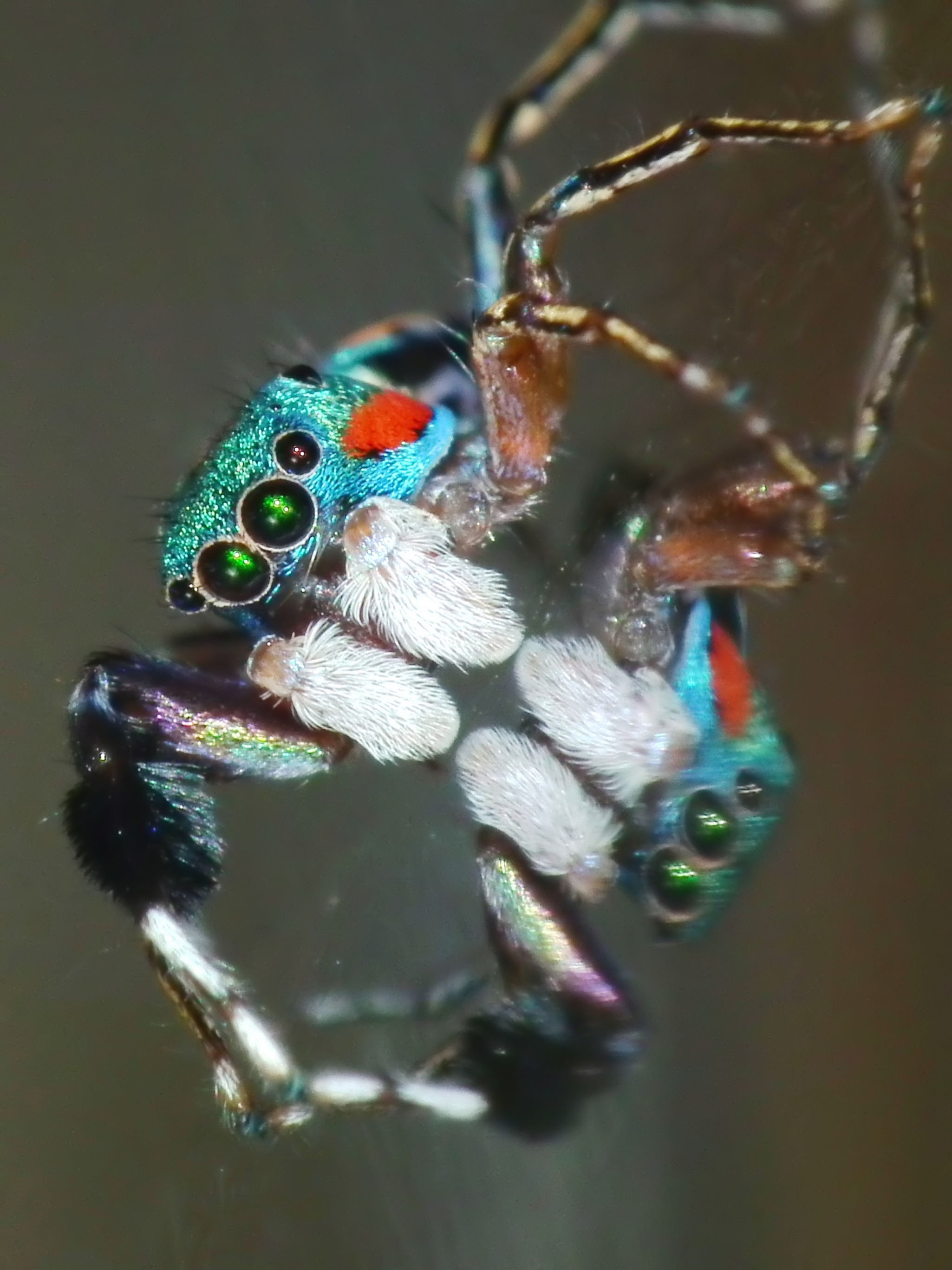 Saw at park area.